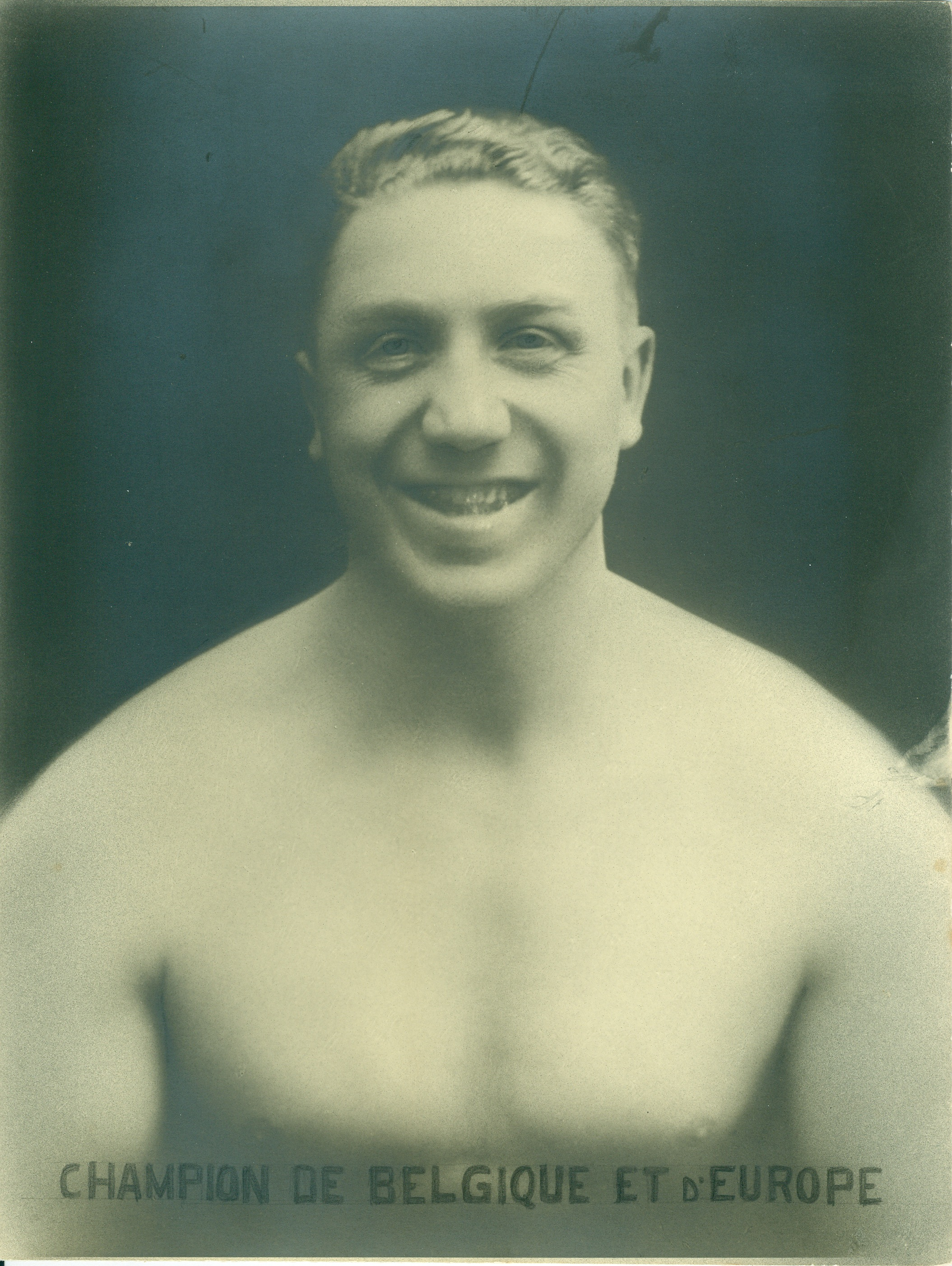 Photo du champion d'europe de 1924 Fernand delarge frère de Jean delarge